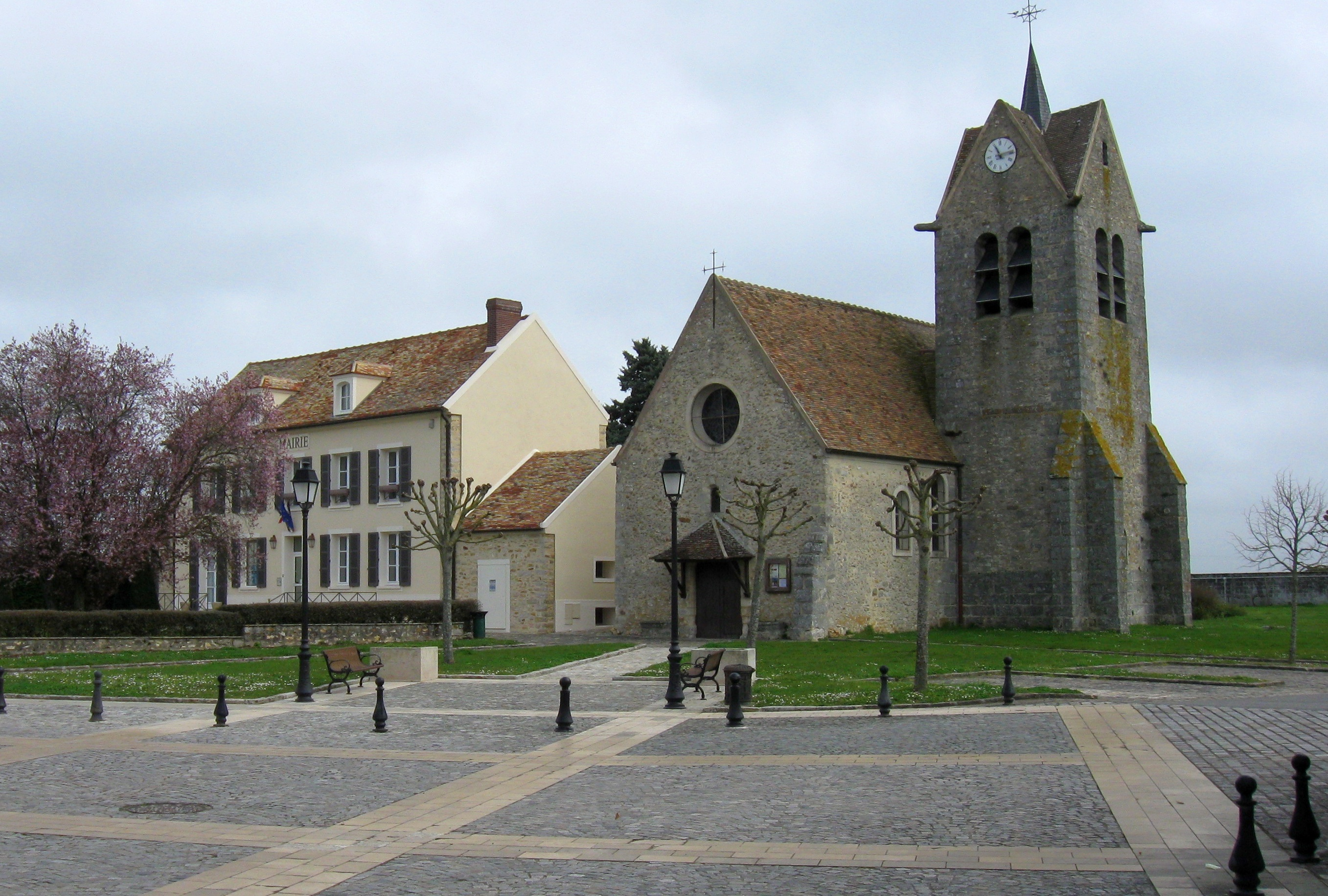 Église Notre-Dame d'Aubigny et mairie de Montereau-sur-le-Jard. (Seine-et-Marne, région Île-de-France).